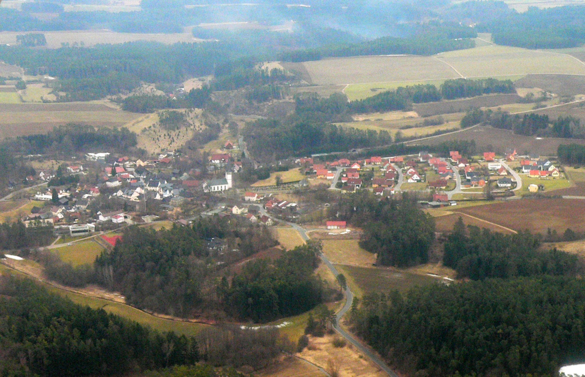 Gemeinde Wonsees, Landkreis Kulmbach, Fränkische Schweiz, Bayern; links im Hintergrund Teile des NSG „Wacholderhänge bei Wonsees“